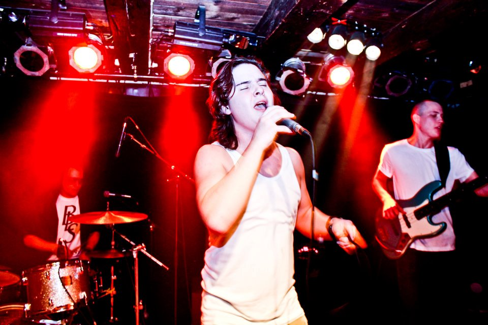 Billede af Lukas Graham, der spiller på Loppen på Christiania